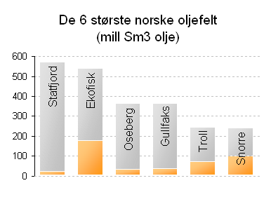 Petroleumsvirksomhet i Norge. Stolpediagram: De 6 største oljefelt på norsk sokkel. Basert på offentliggjorte tall fra Oljedirektoratet pr 8. mars 2006. Indikator for hva som er gjenværende i hvert felt.